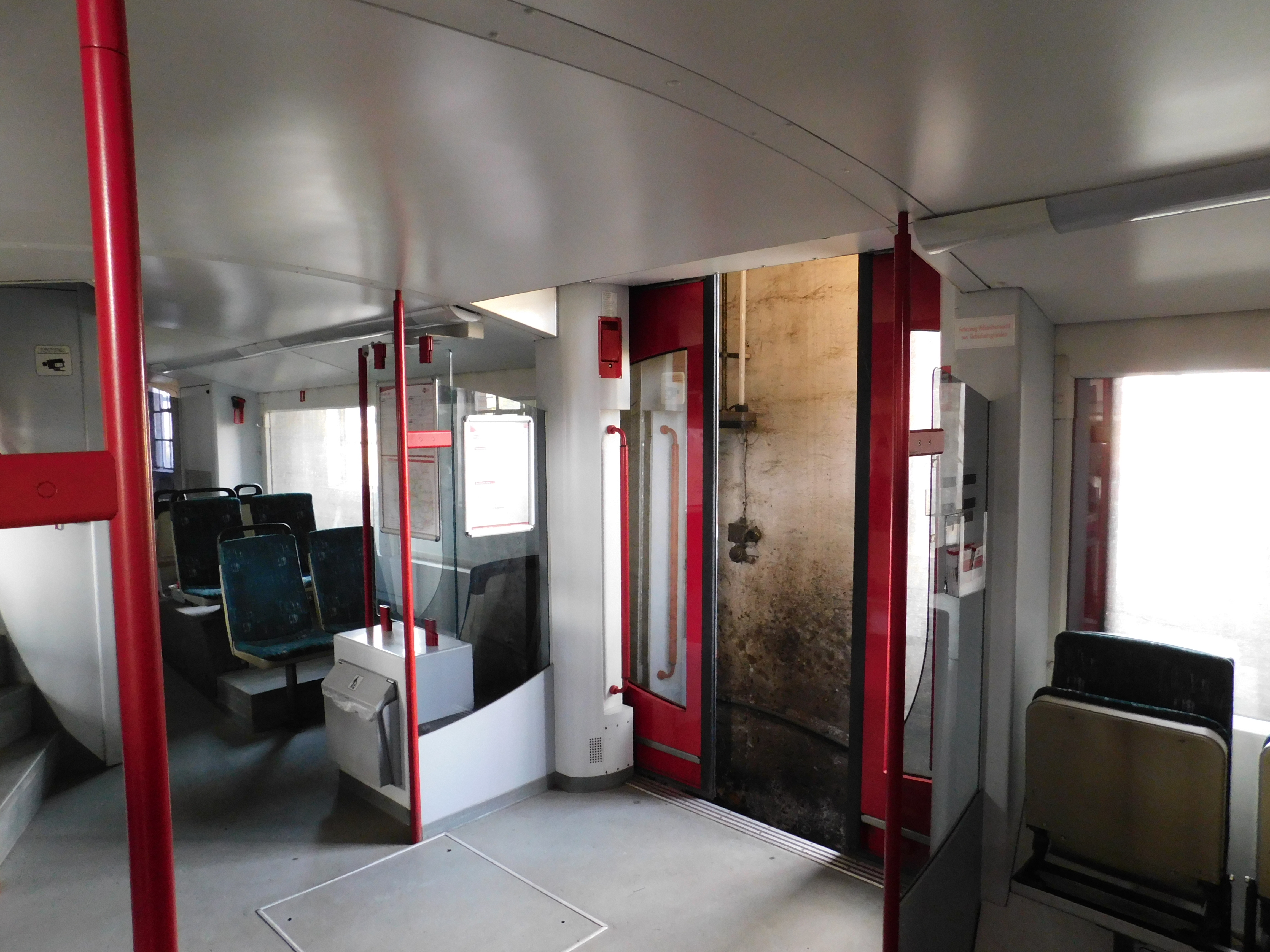 Innenraum im Unterdeck